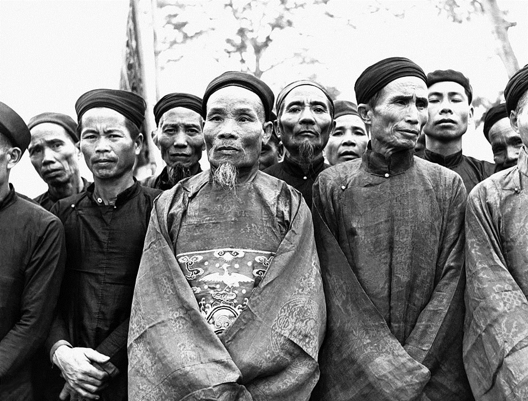 A Hoa Binh, les notables Muong accueillent Bao Dai le 21 décembre 1951 au Vietnam.